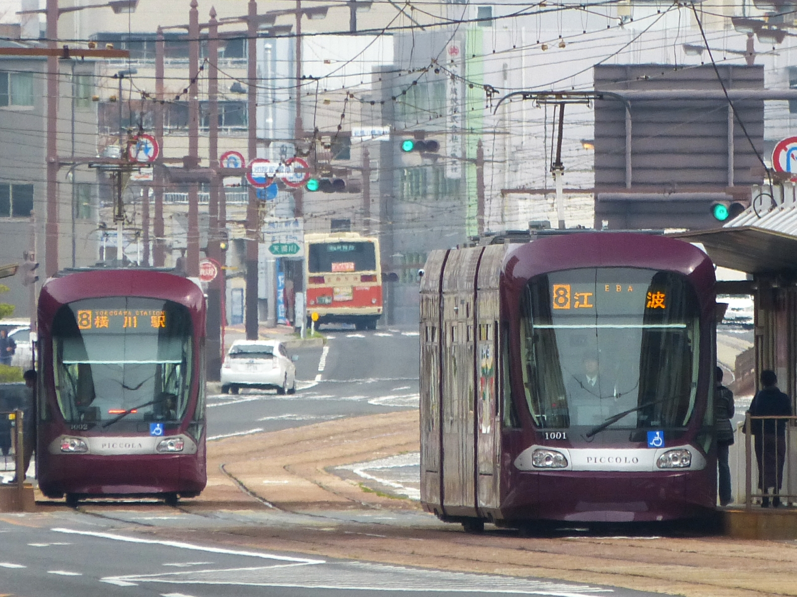 広島電鉄1001号「PICCOLO」(右) と 1002号「PICCOLA」(左)